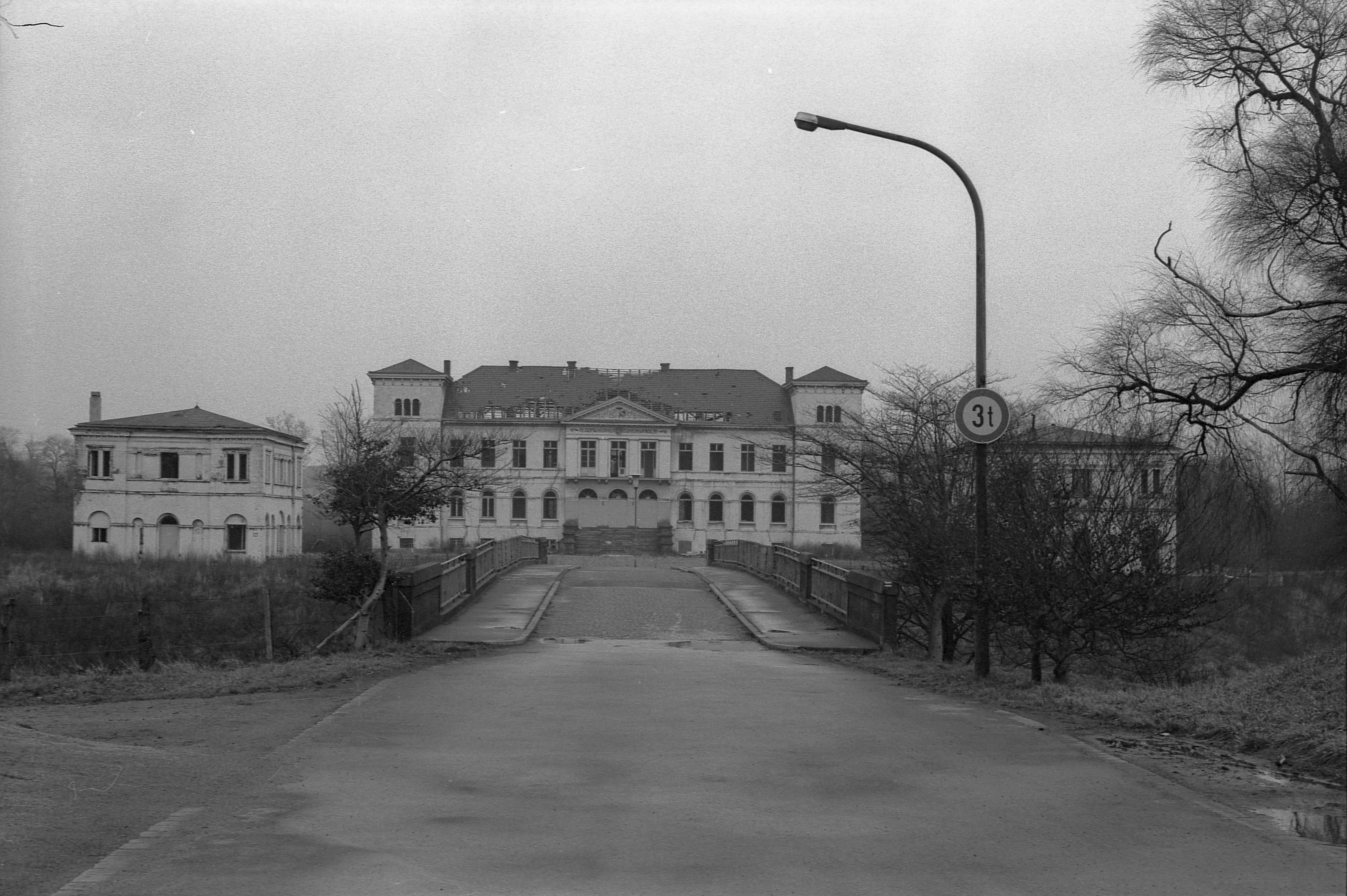 Haus Buddenburg Frühjahr 1977 Blick über die Lippebrücke auf Haupthaus und Pavillons